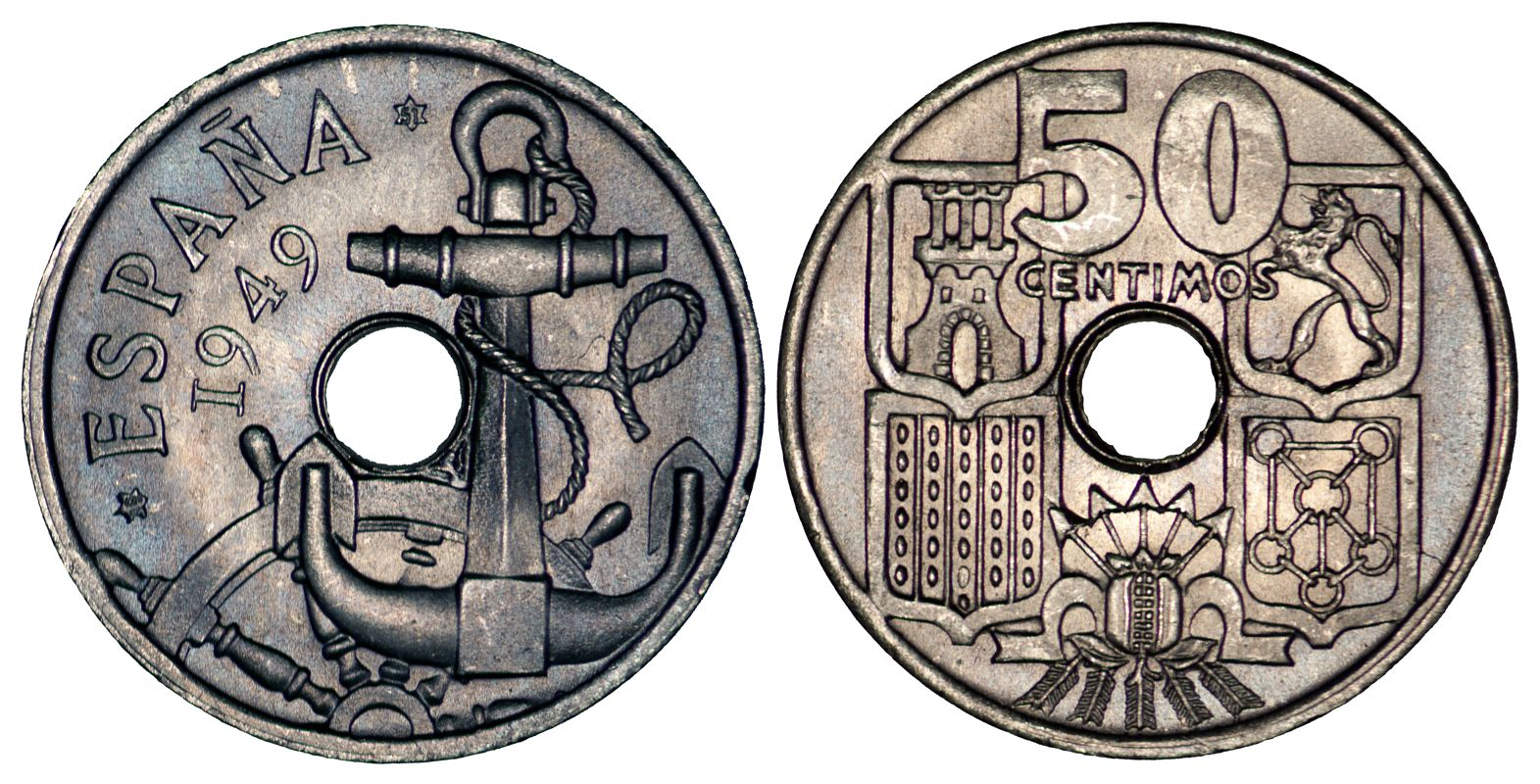 50 Céntimos 1949